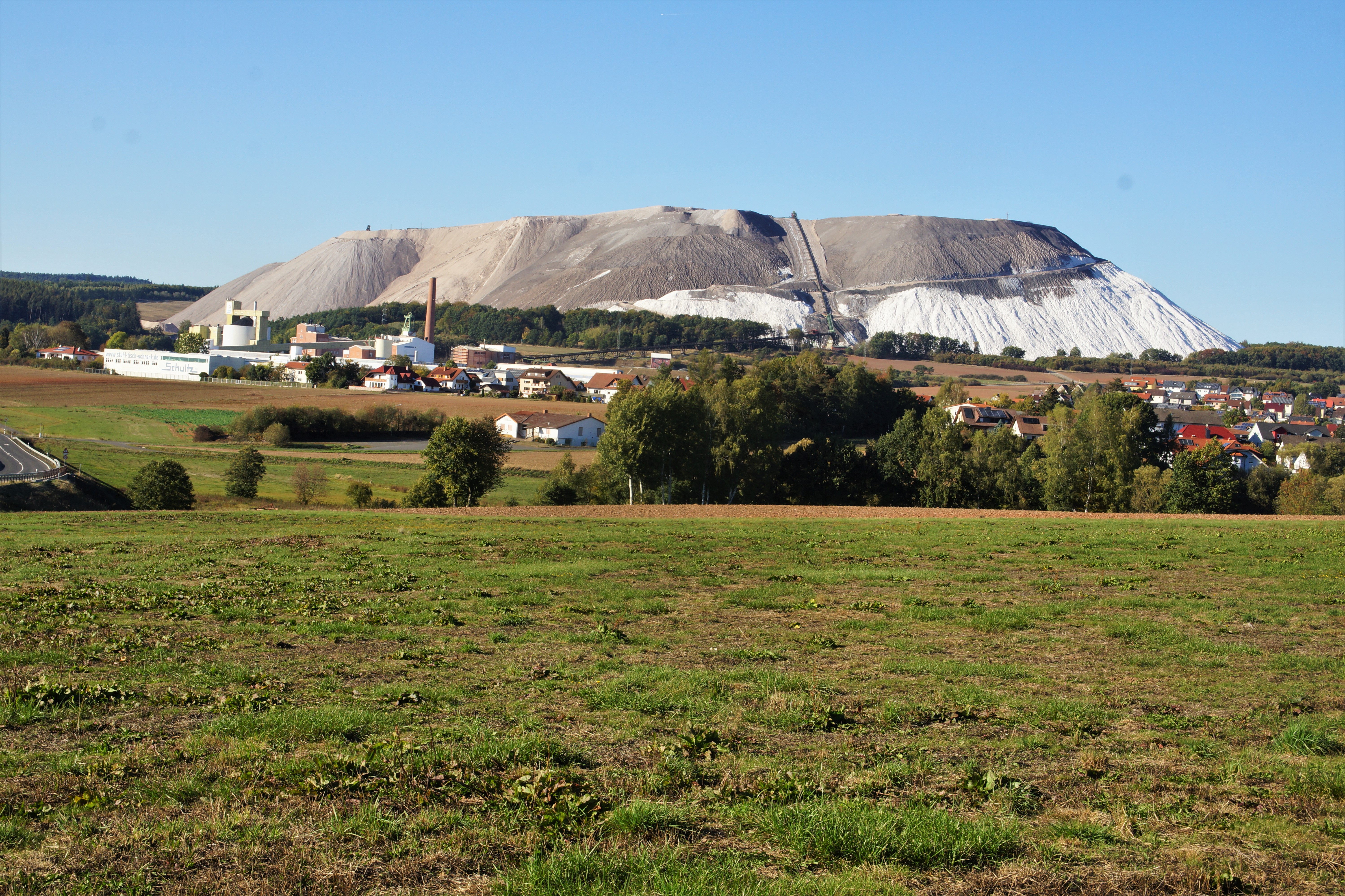 K + S Werksgelände und Kaliberg in Neuhof